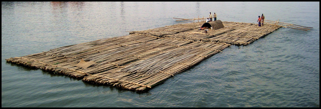 Bamboo Raft, Bangladesh